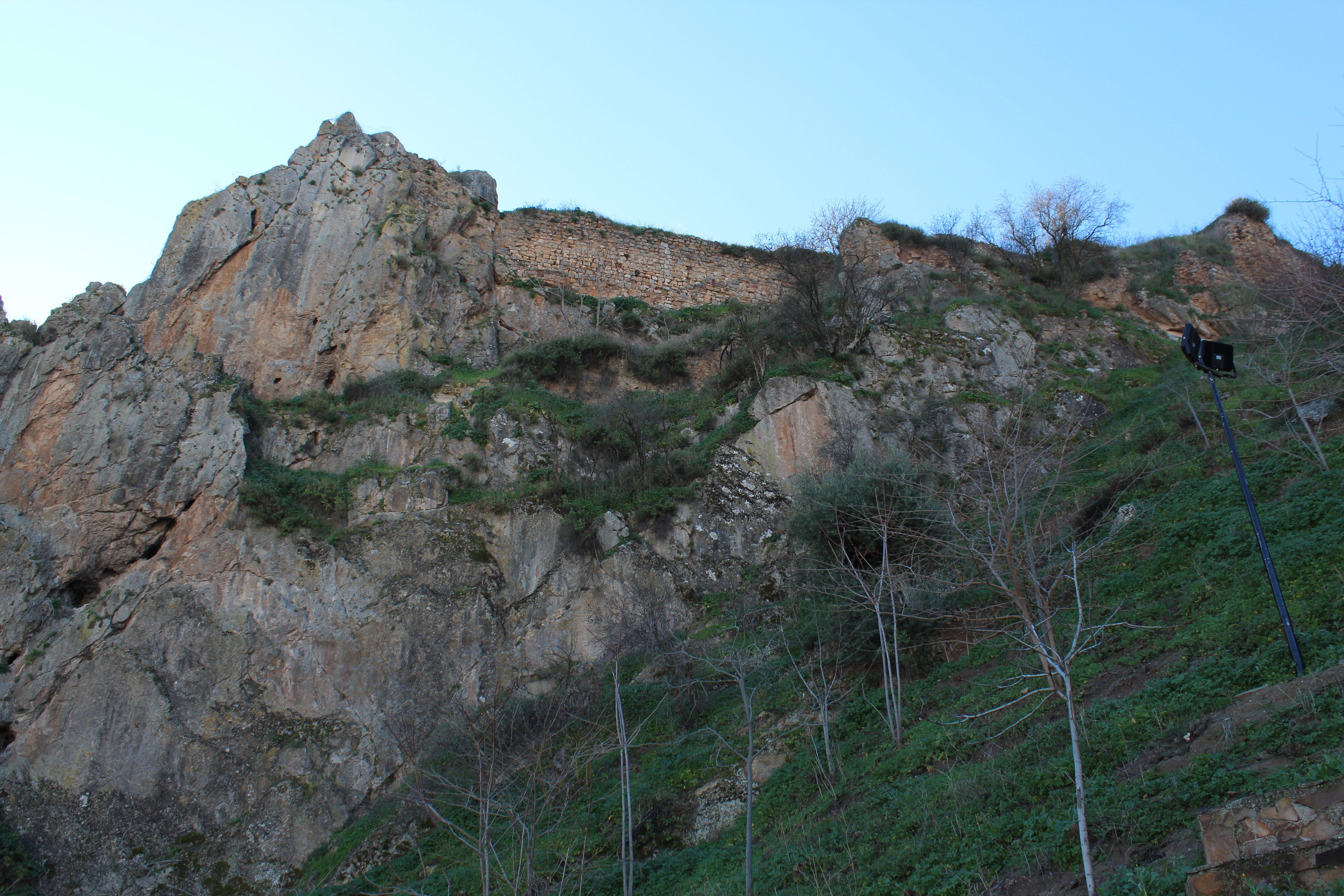 Vista del recinto exterior de mampostería del Castillo de Cambil.